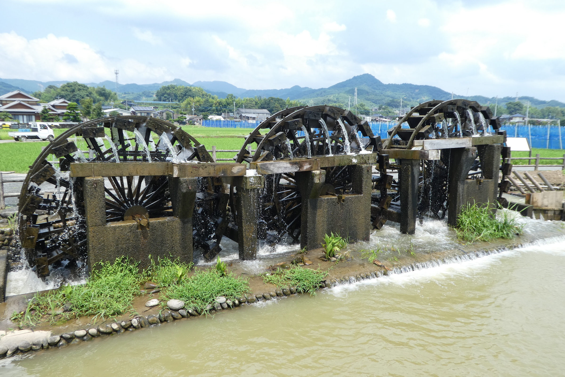 福岡県朝倉市の菱野三連水車。